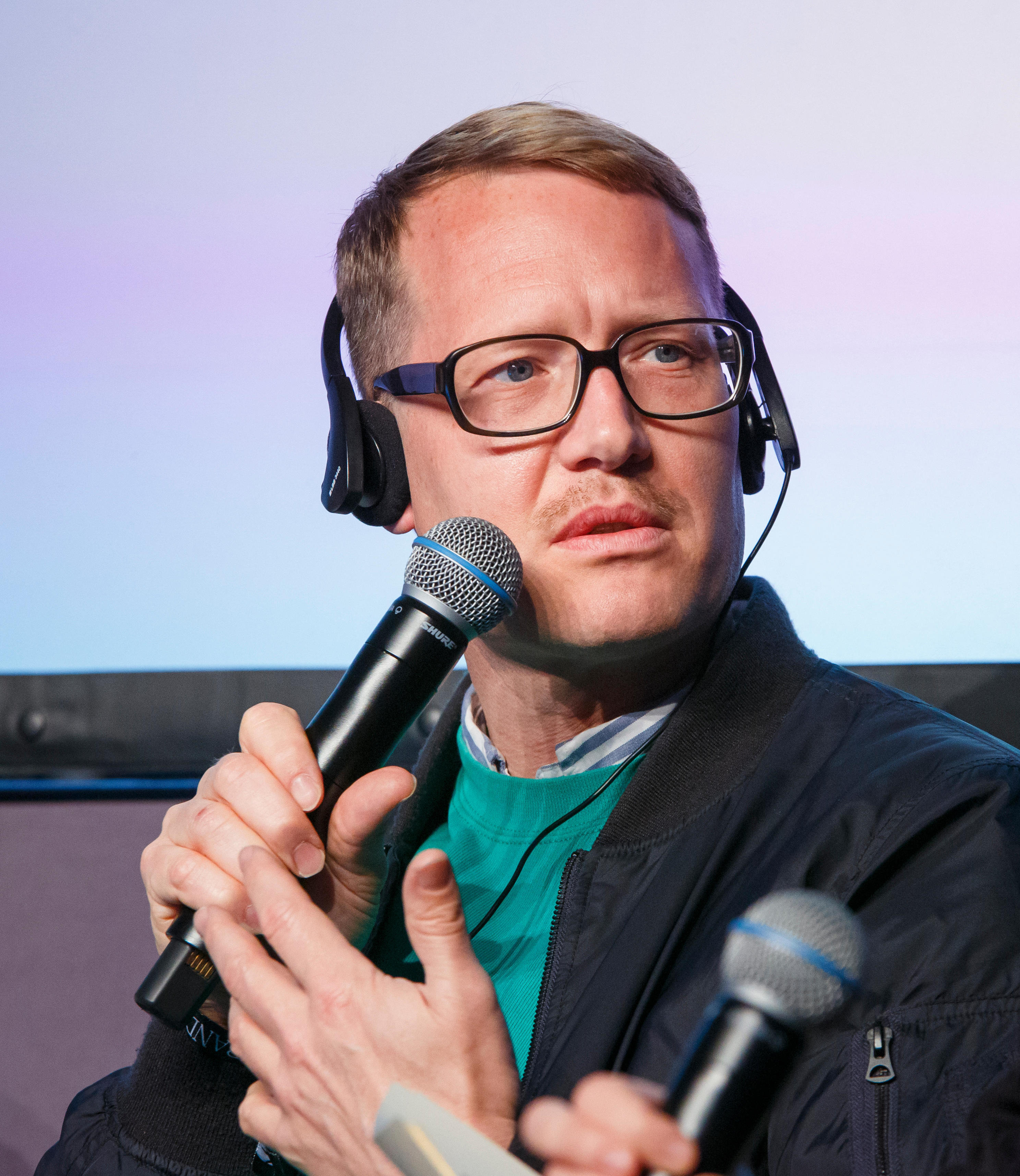 Session: Reality Check: Pop-Diskurs Speaker: Thomas Venker, Diviam Hoffmann, Sonja Eismann, Katharina Holzmann, Nadine Schildhauer